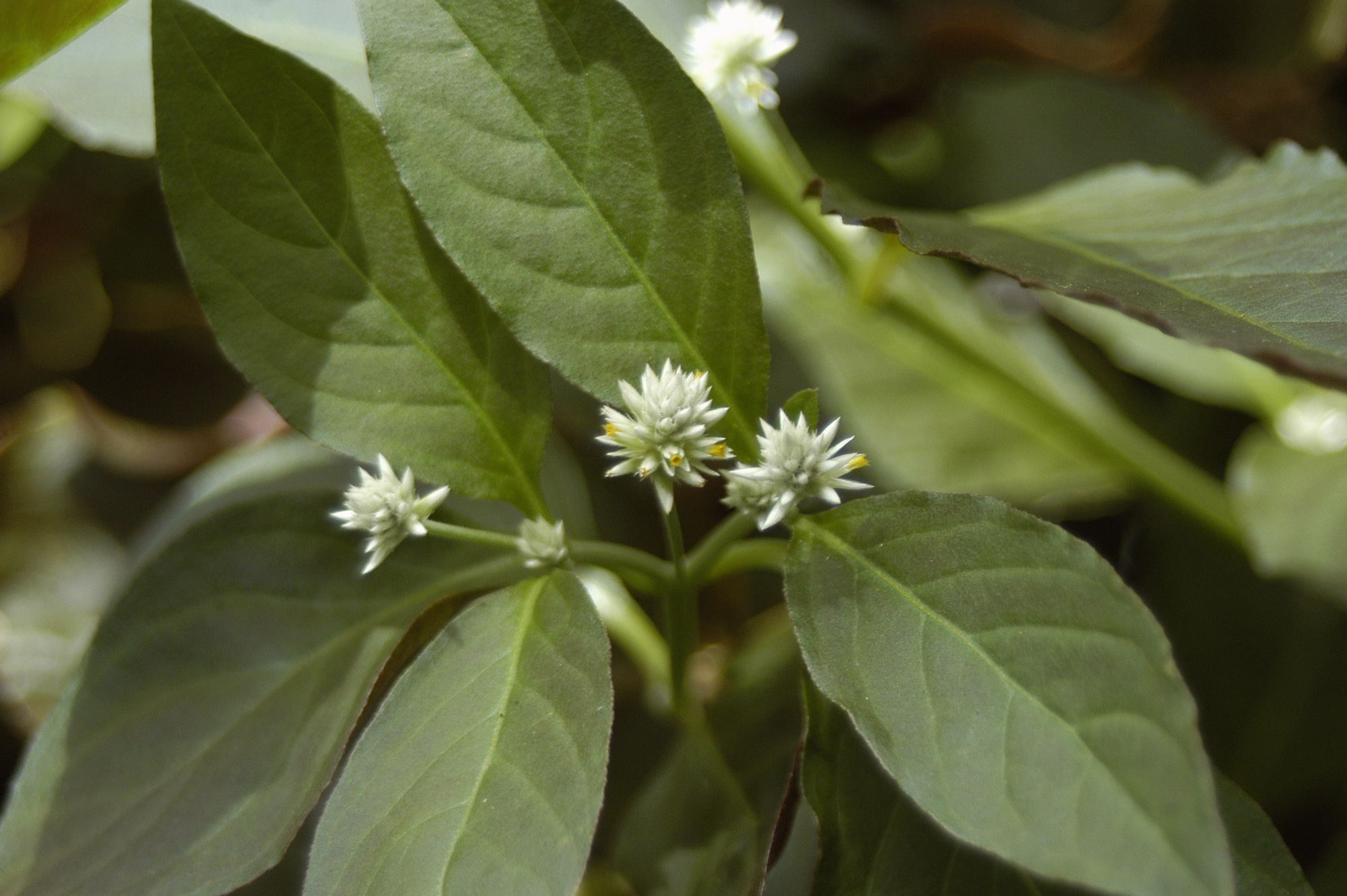 Alternanthera brasiliana, (Alternanthera dentata) conhecida popularmente com Pepétua do mato, terramicina, penicilina e anador